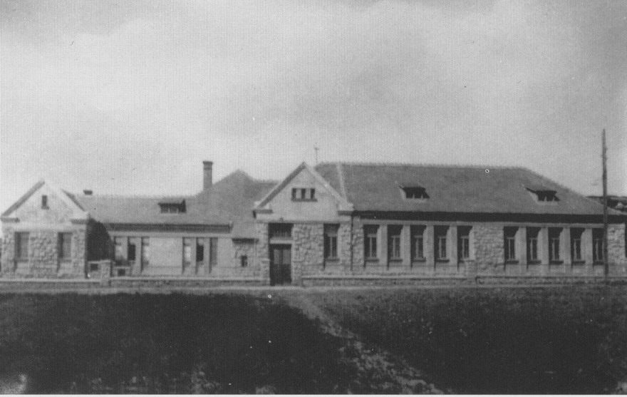 A pécsi Bártfa Utcai Általános Iskola régi épületének a homlokzata.